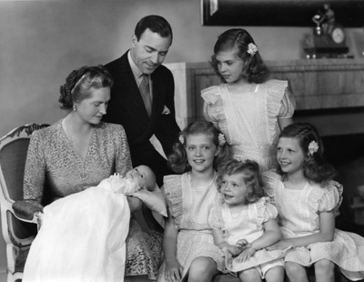 Sibylla med Prins Gustaf Adolf och alla barnen; nuvarande kung Carl XVI Gustaf i knäet.